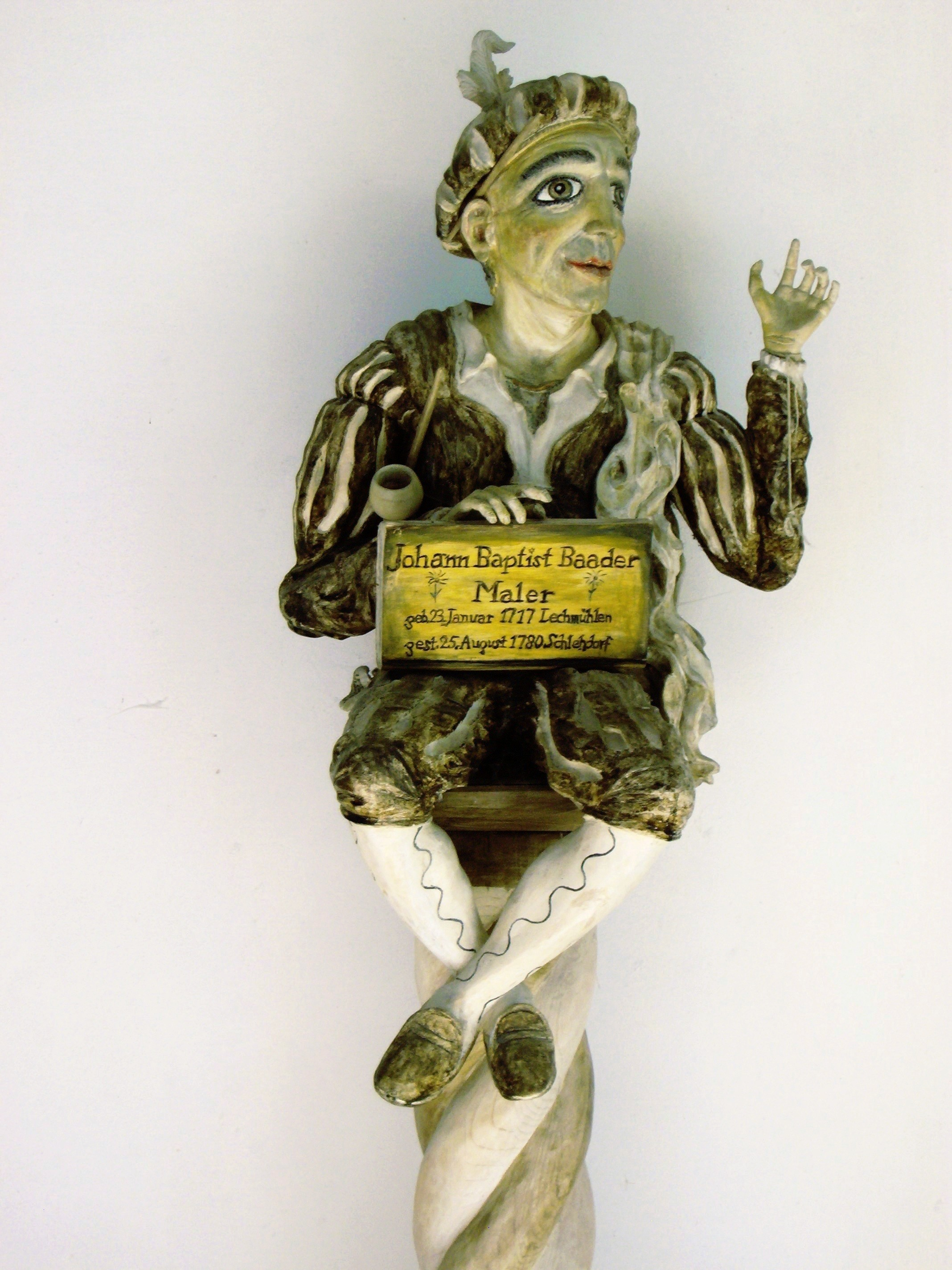 Statue des Lechhansl (Johann Baptist Baader) in der Kapelle seines Geburtsorts Lechmühlen (Teil der Verwaltungsgemeinschaft Fuchstal, Landkreis Landsberg am Lech, RegBez Oberbayern) Diese Statue wurde von Norbert Spengler in reiner Handarbeit angefertigt und von ihm in der Kapelle in Lechhmühlen in Gedenken an Johann Baptist Baader aufgestellt.